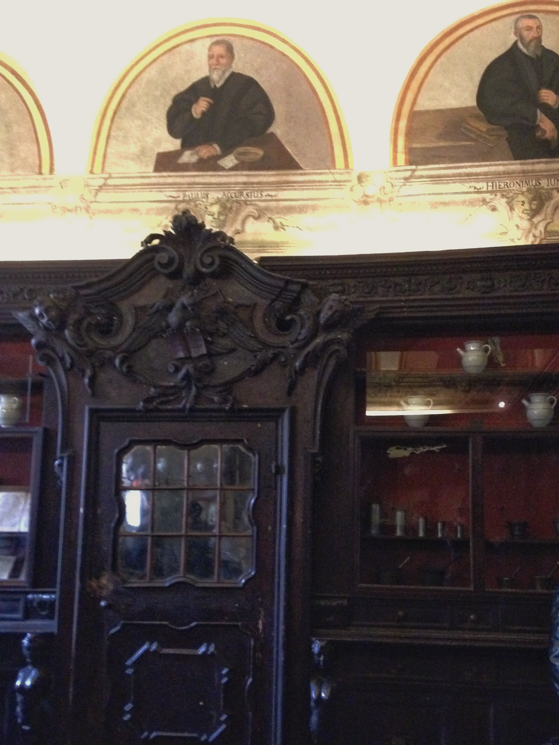 Stanza delle sirene dell'antica spezieria